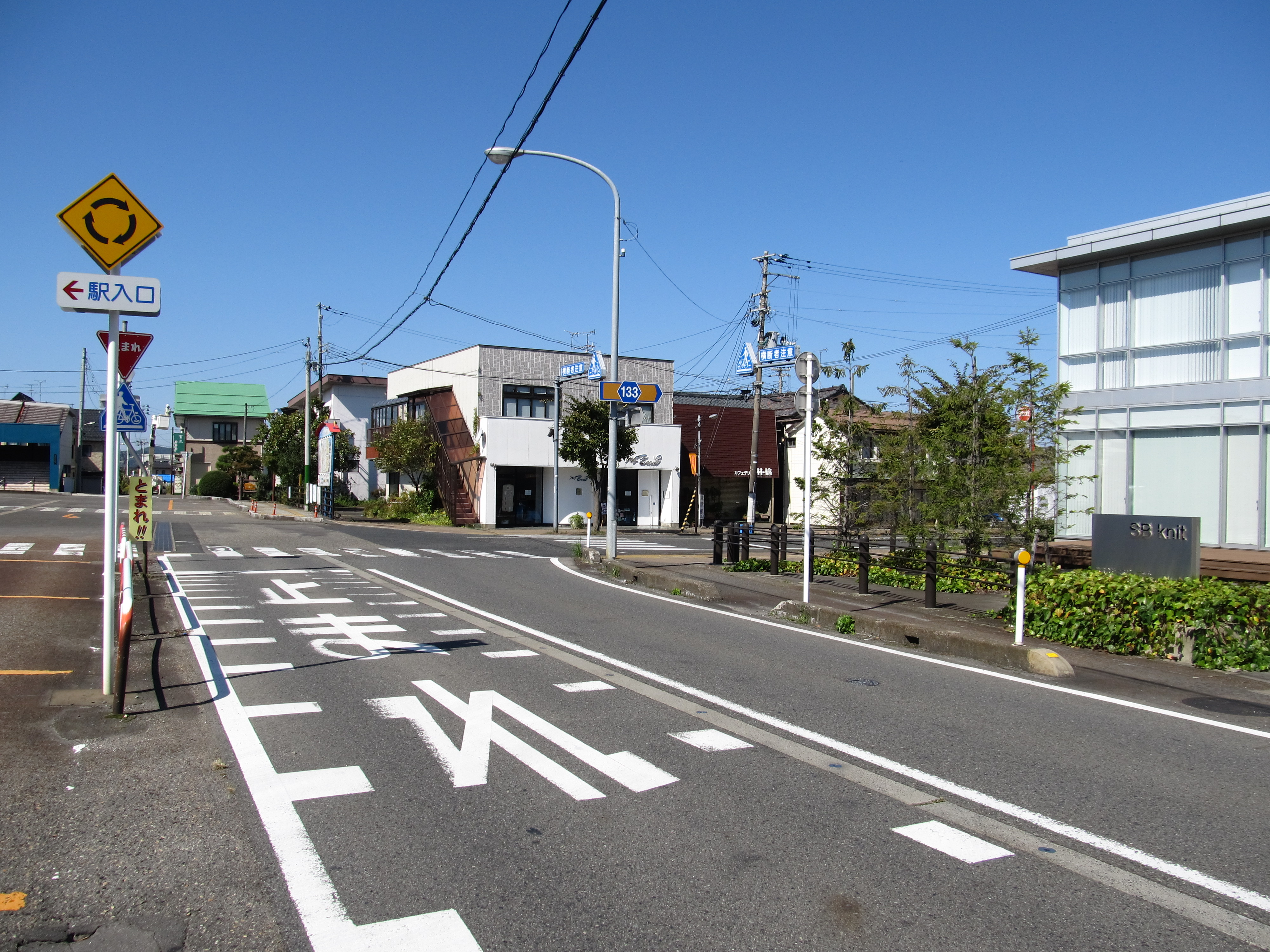 新潟県五泉市の東日本旅客鉄道（JR東日本）磐越西線五泉駅前にある、新潟県道133号五泉停車場線および新潟県道403号五泉停車場石曽根線の起点。